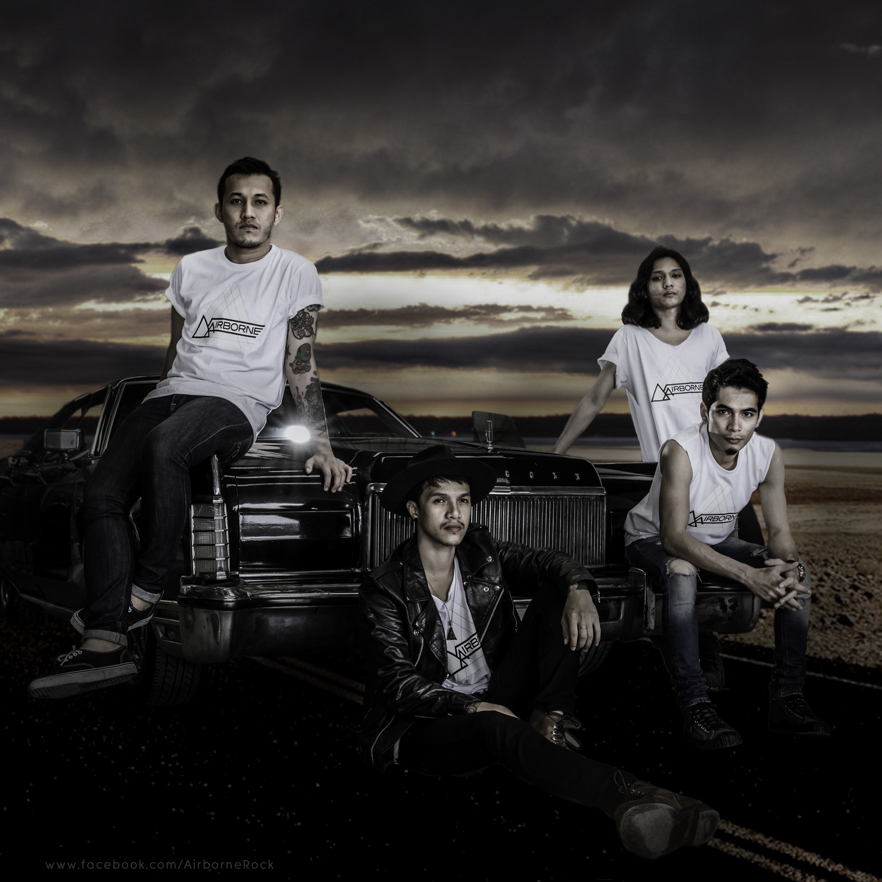 ภาพวงแอร์บอร์น ปี 2558